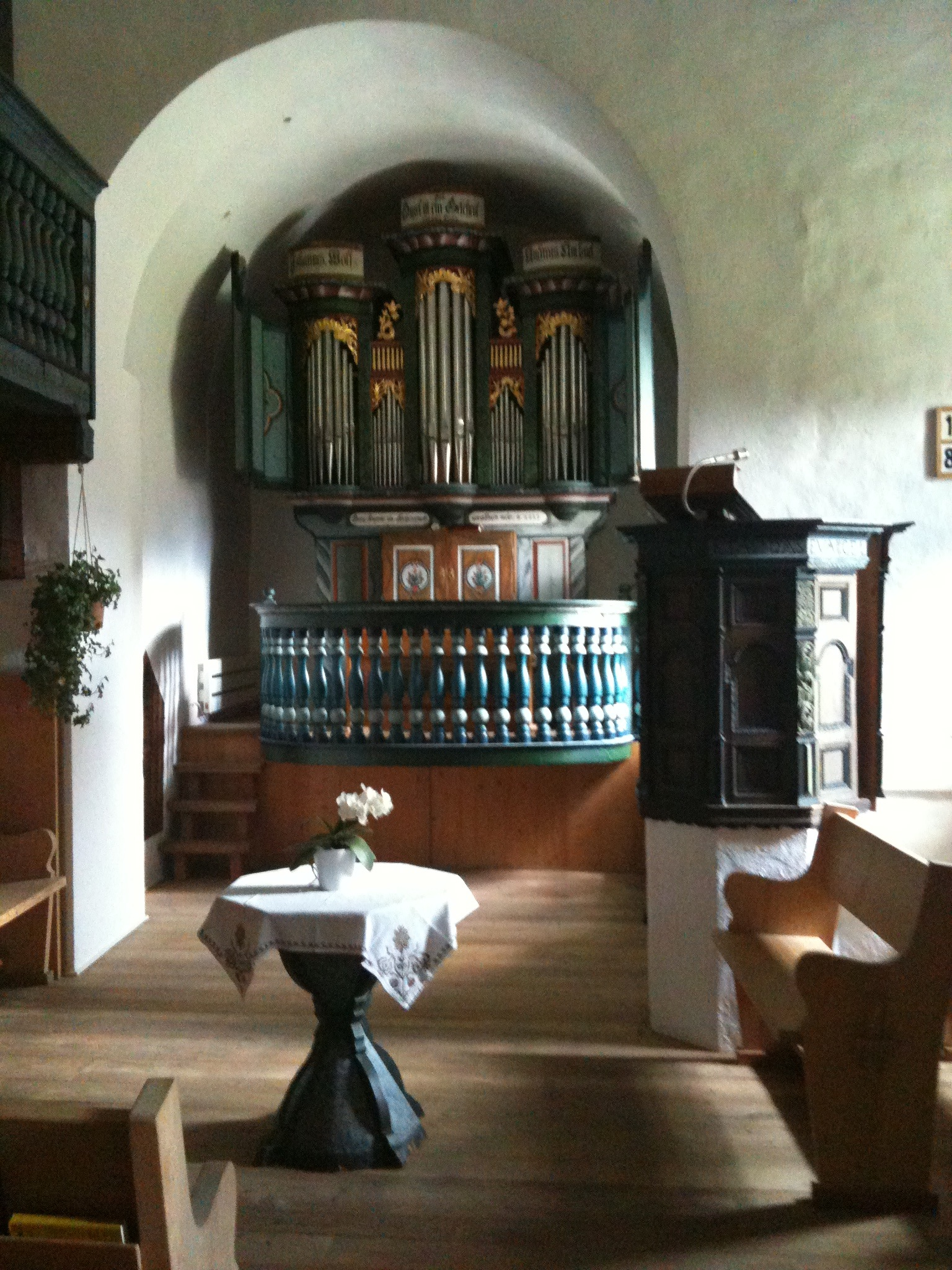 reformierte Kirche Davos Glaris, Kanton Graubünden